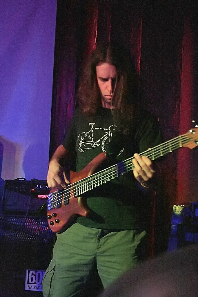 Zespół Thesis - Jan Kaliszewski